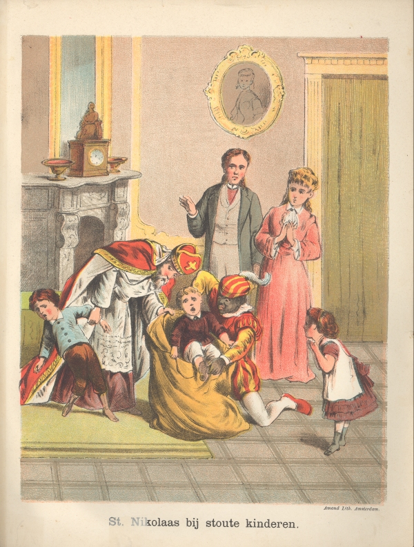 St. Nikolaas en zijn knecht / [J. Schenkman]. - Amsterdam : J. Vlieger, [ca.1885]. - [22] p. : bruine en 6 gekl. ill. ; 30 cm. - Litho's gedrukt door Amand Lith, Amst.